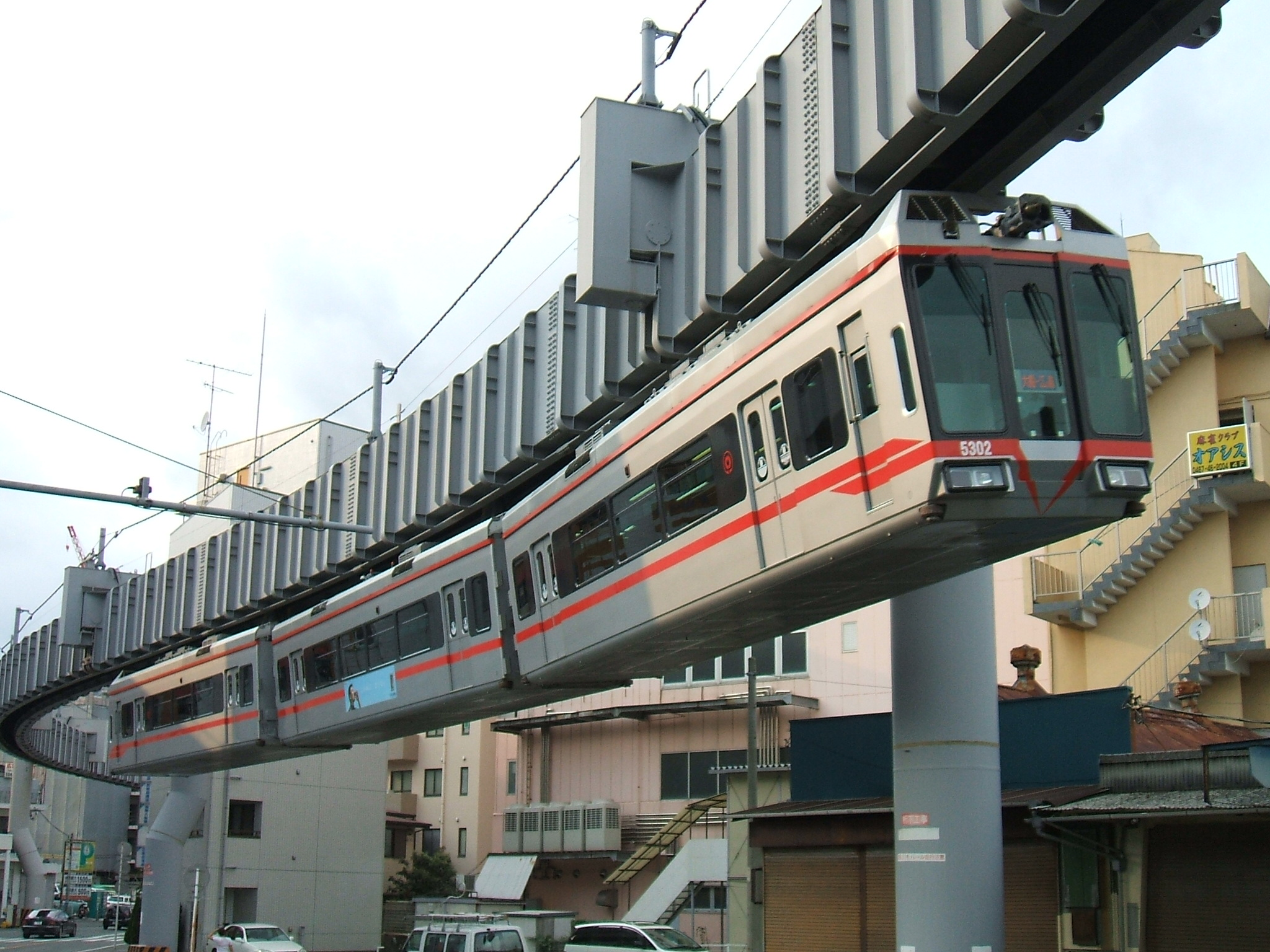 5000系外観。大船～富士見町間にて撮影。